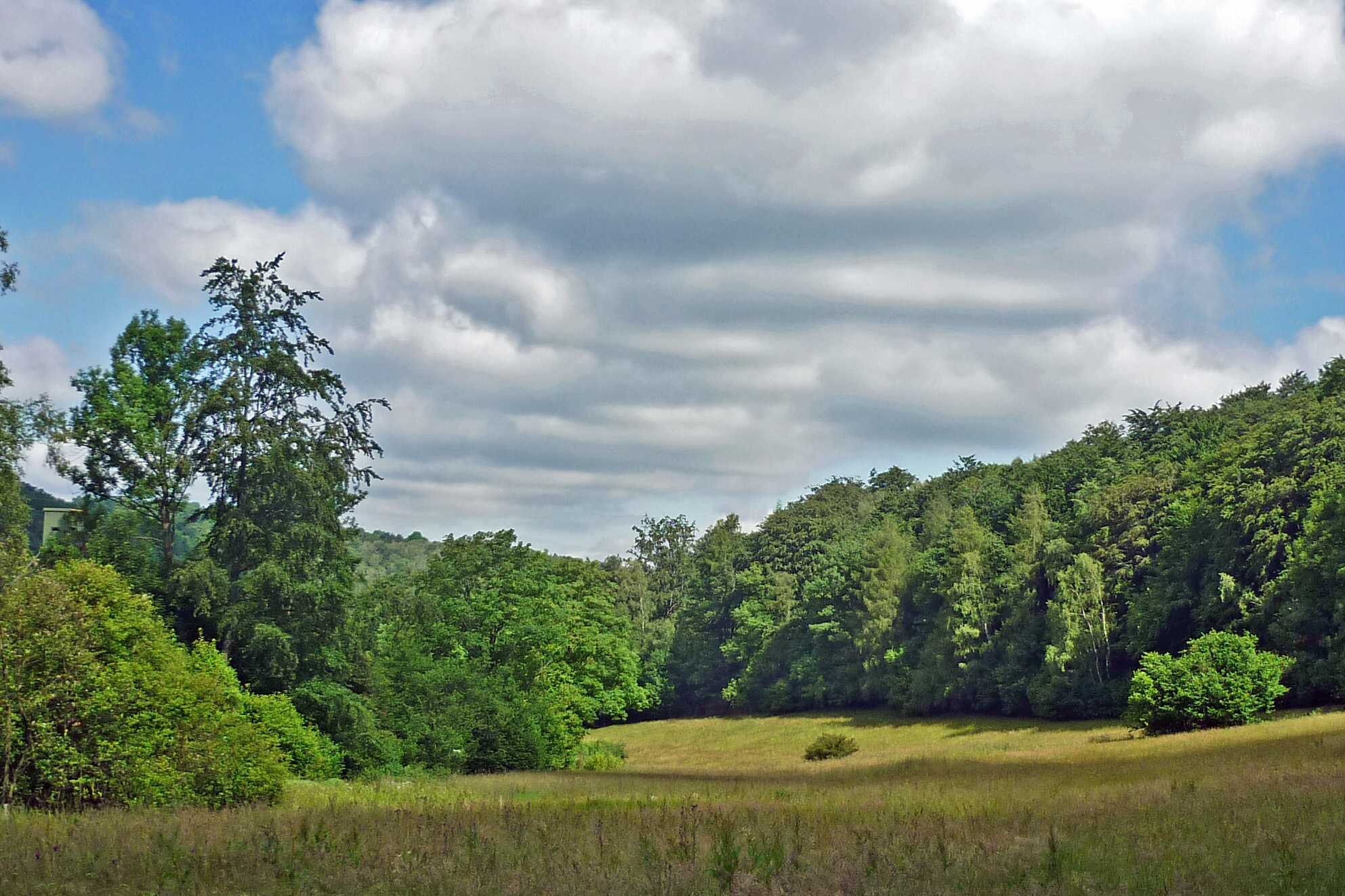 Naturschutzgebiet D50 „Oelsen“ bzw. „Mittelgebirgslandschaft um Oelsen“ im Bereich Bienhof, Bad Gottleuba-Berggießhübel, Landkreis Sächsische Schweiz-Osterzgebirge